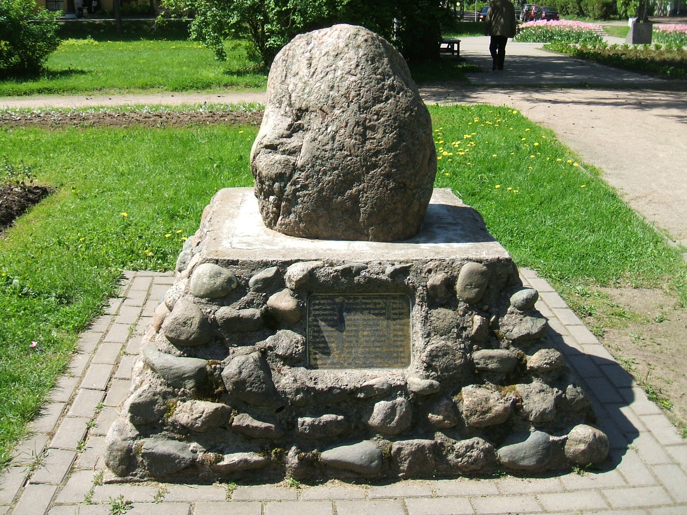 В память финских воинов, похороненным в Зеленогорске у Кирхи в период 1939-1944 годов